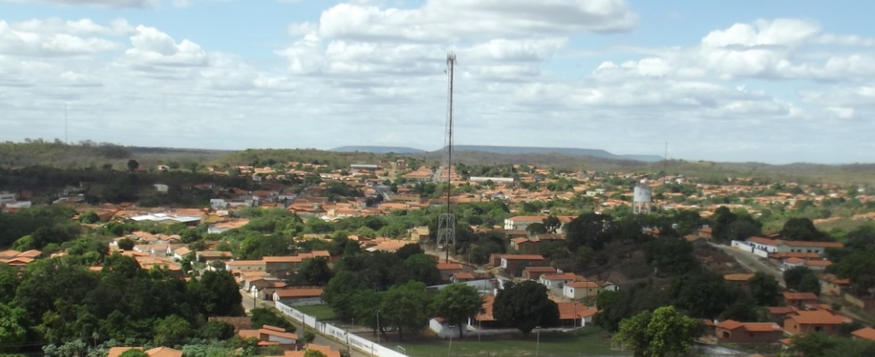 Vista de Elesbão Veloso